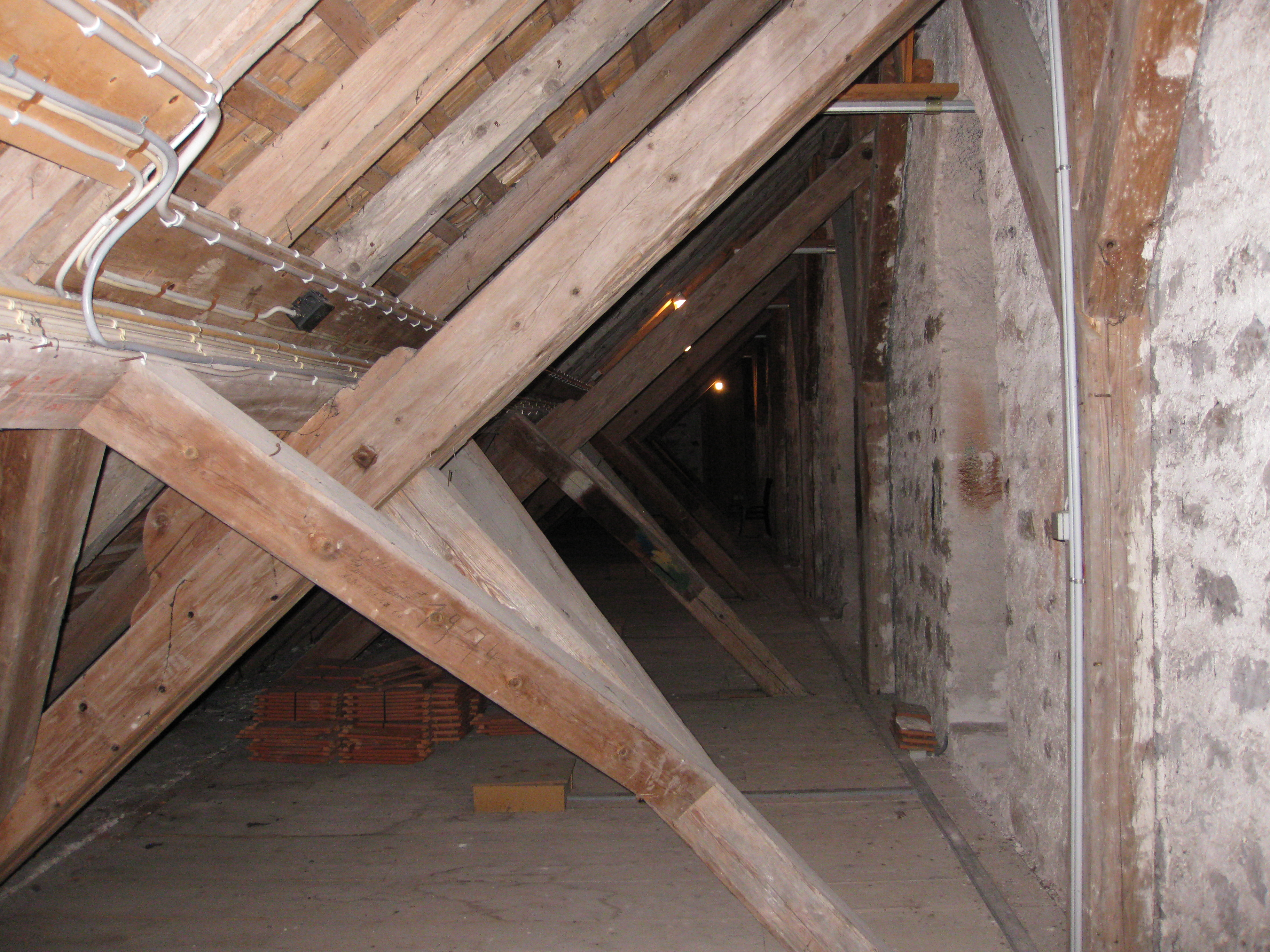 Speicher vom Seitenschiff